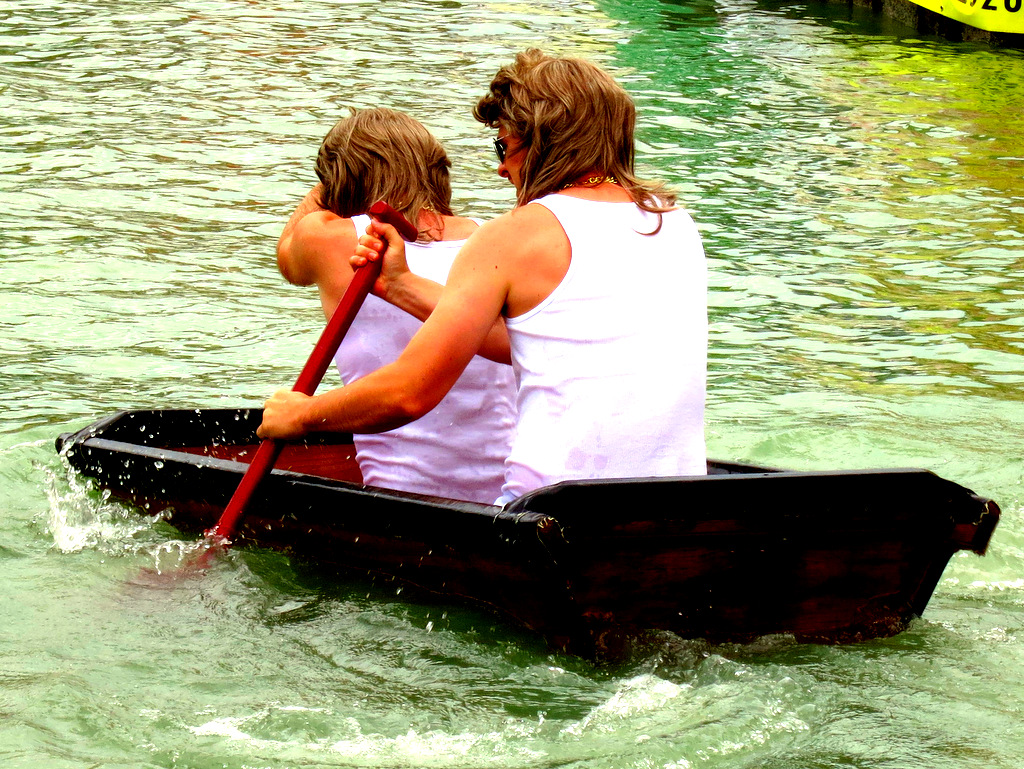 Zwei Teilnehmer eines Sautrogrennens im Einsatz